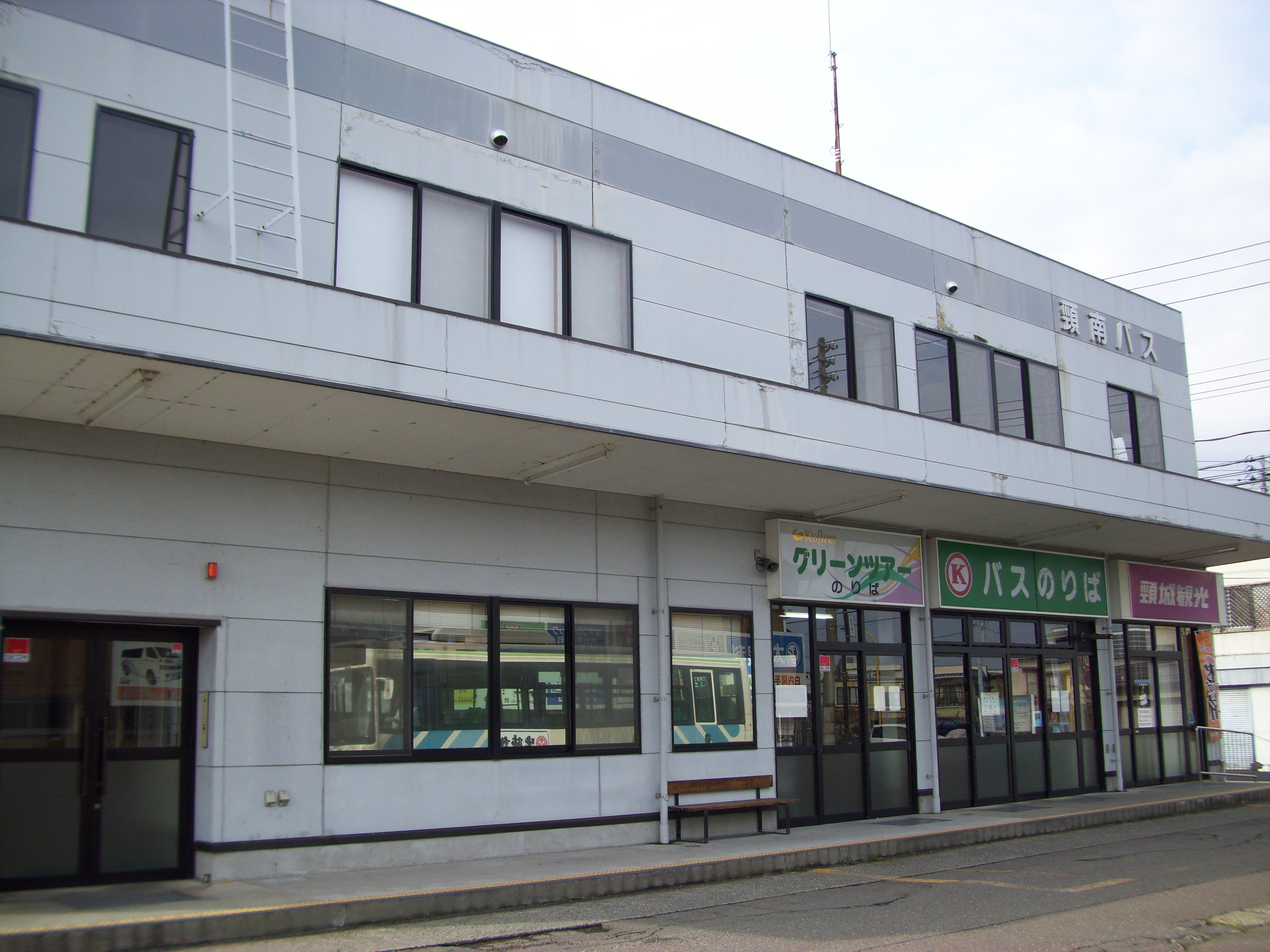 頸南バスの本社営業所である新井バスターミナルの建物